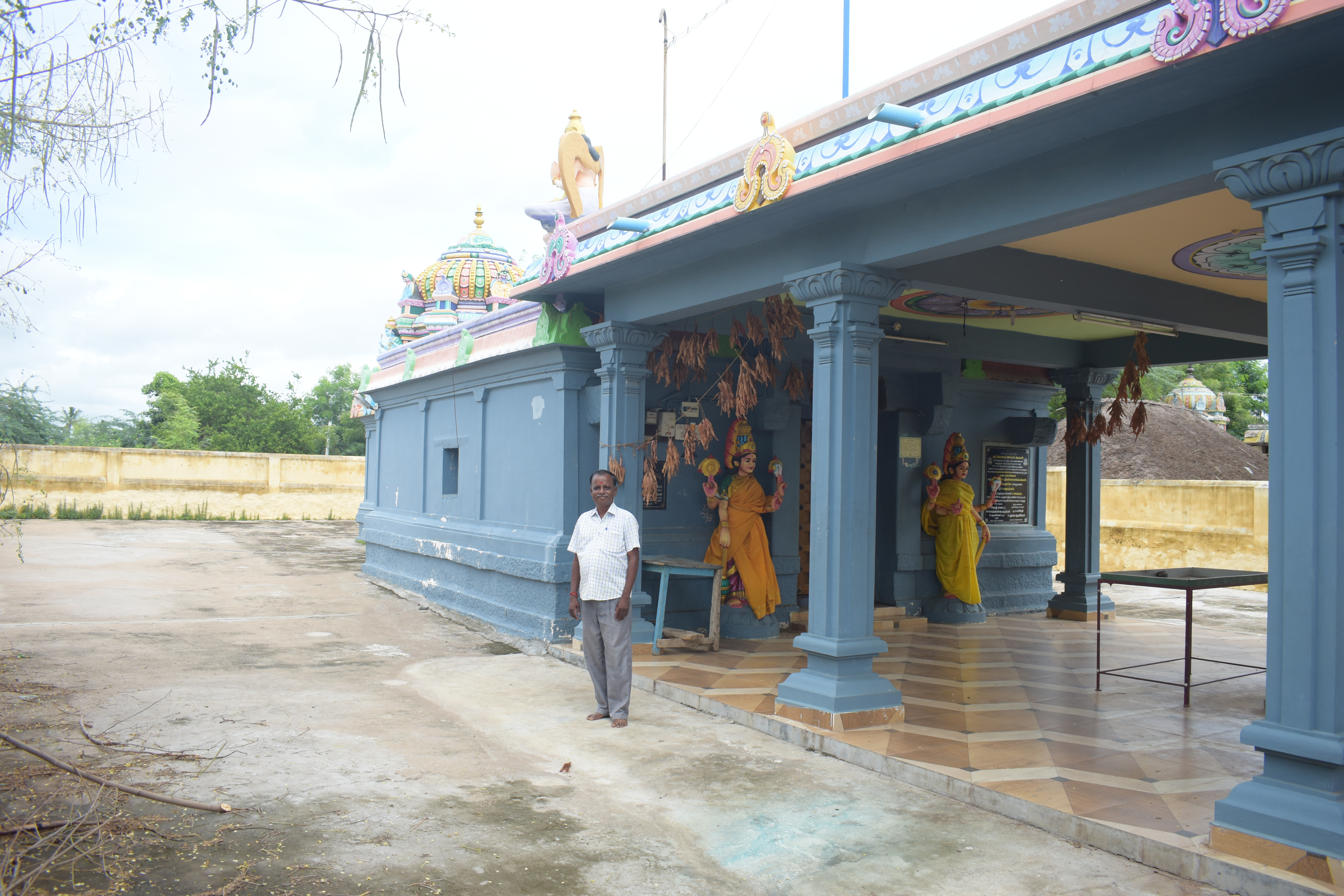 பாதூர் திரௌபதியம்மன் கோயில்